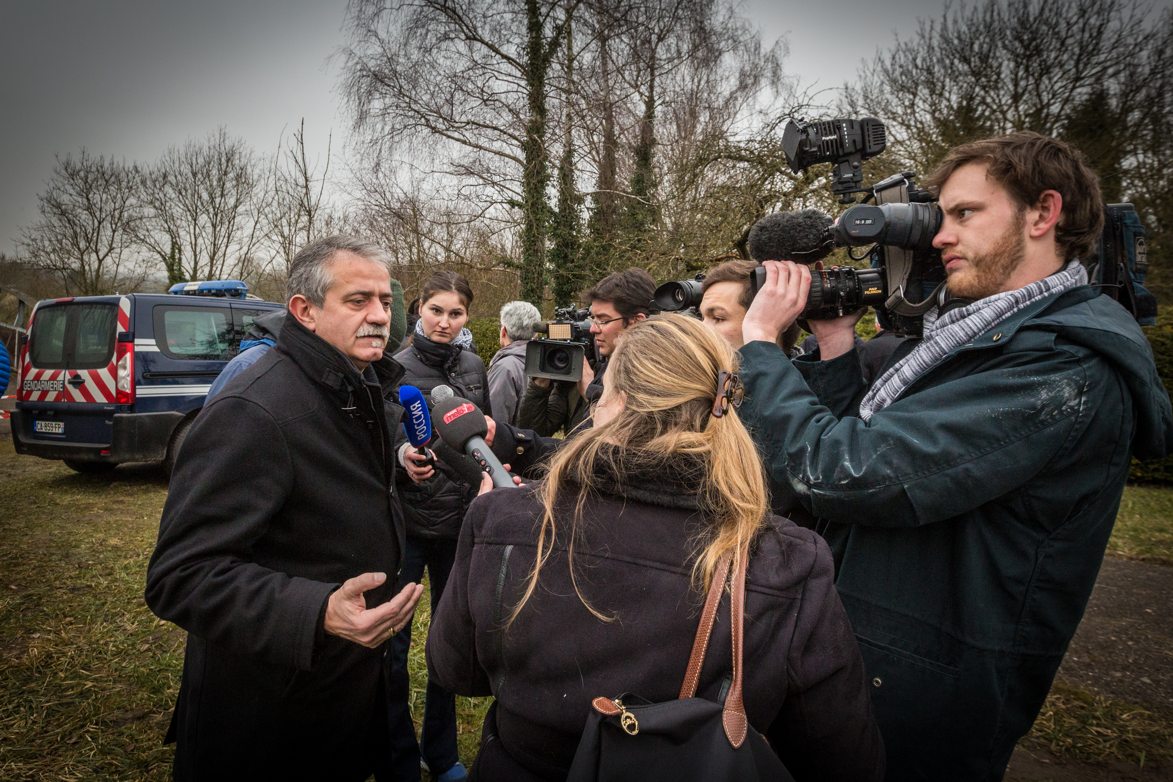 Marc Séné, Sarre-Union fait une déclaration à la presse après la profanation de cimetière juif.